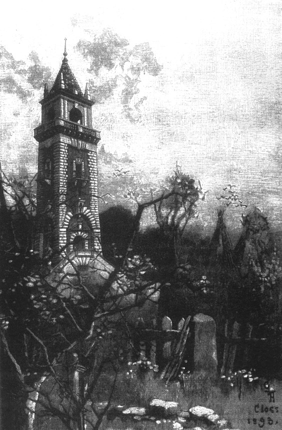 Kaiser-Wilhelm-Turm (heute Österbergturm) in Tübingen, Zeichnung)